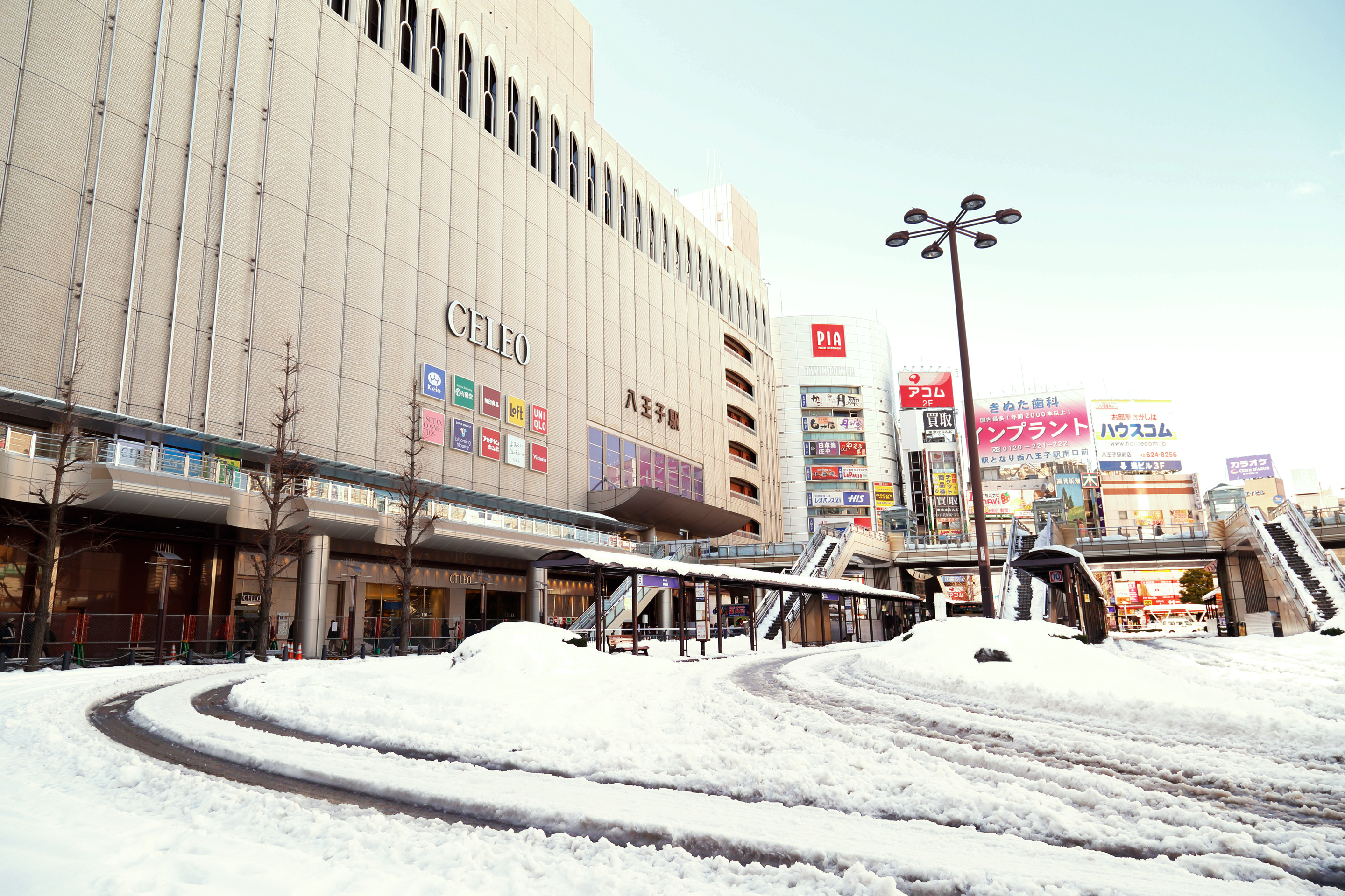 2014年2月降雪後のja:八王子駅北口バスターミナル付近。